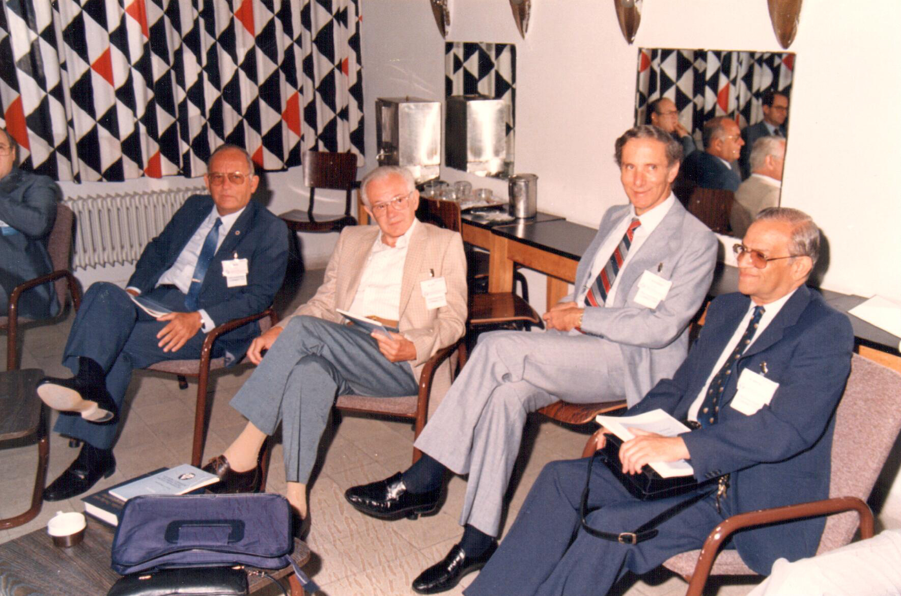 מוריס לוי ז"ל ומשה גרון ז"ל.